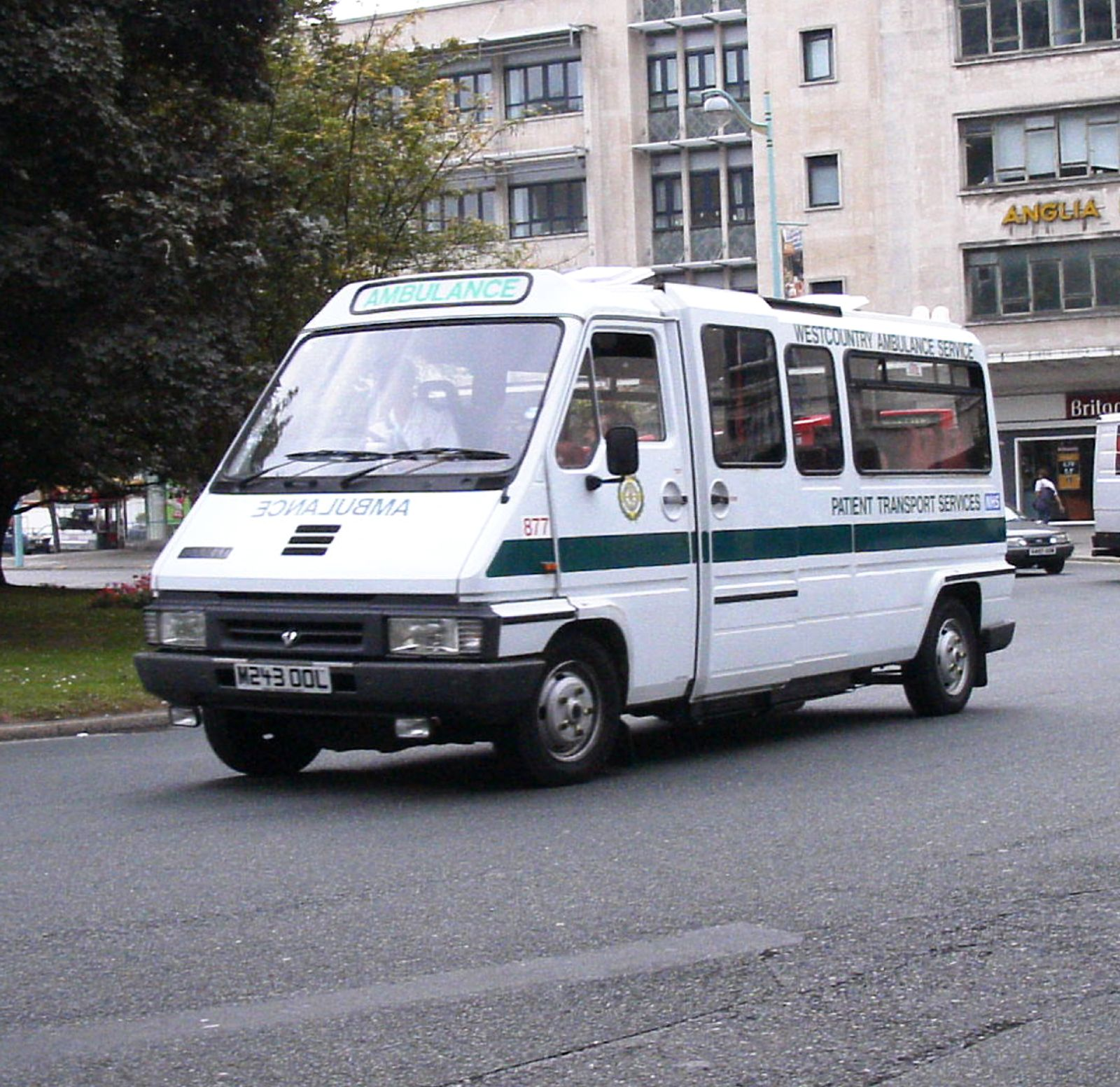 20 September 2002